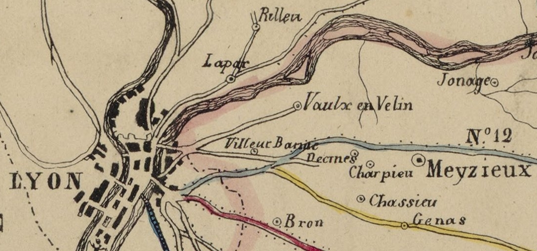 Détail des zones autour de Lyon, Villeurbanne, Lapar, Rilleu, Decines, Charpieu, Jonage, Meyzieux, Chassieu, Genas, Bron, Vaulx-en-Velin.